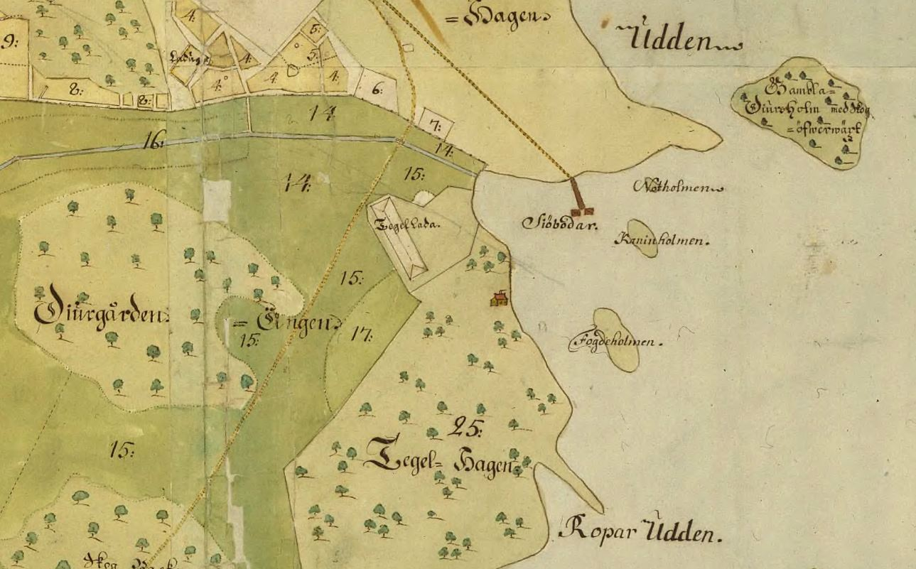 Del av Djursholm visande dagens Samsöviken med öarna Fogdeholmen (Samsö) och Kaninholmen (Vågaskär)